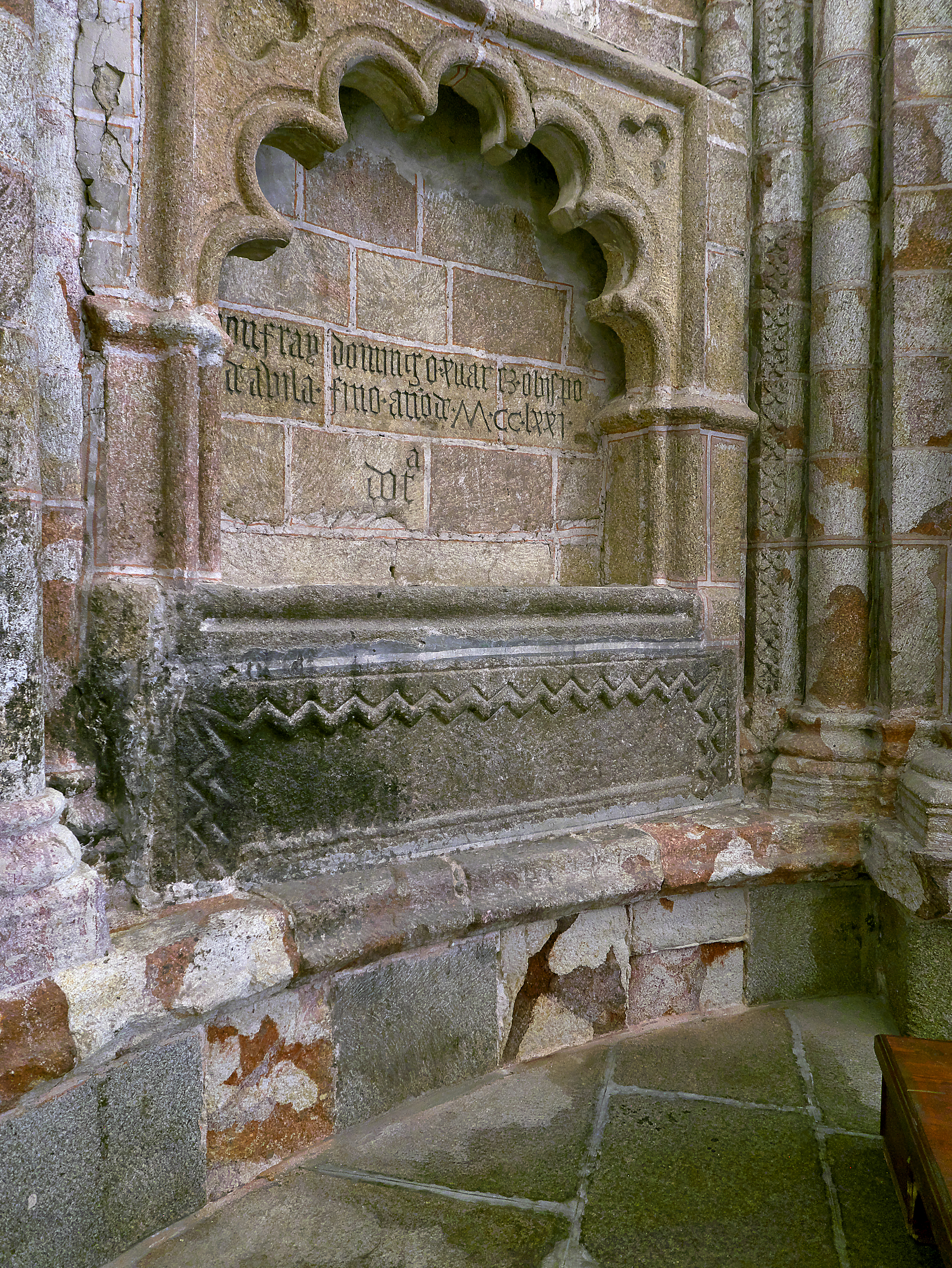 Capilla de San Juan Evangelista, Catedral de Ávila. Sepulcro del obispo franciscano Domingo Juárez (†1271)